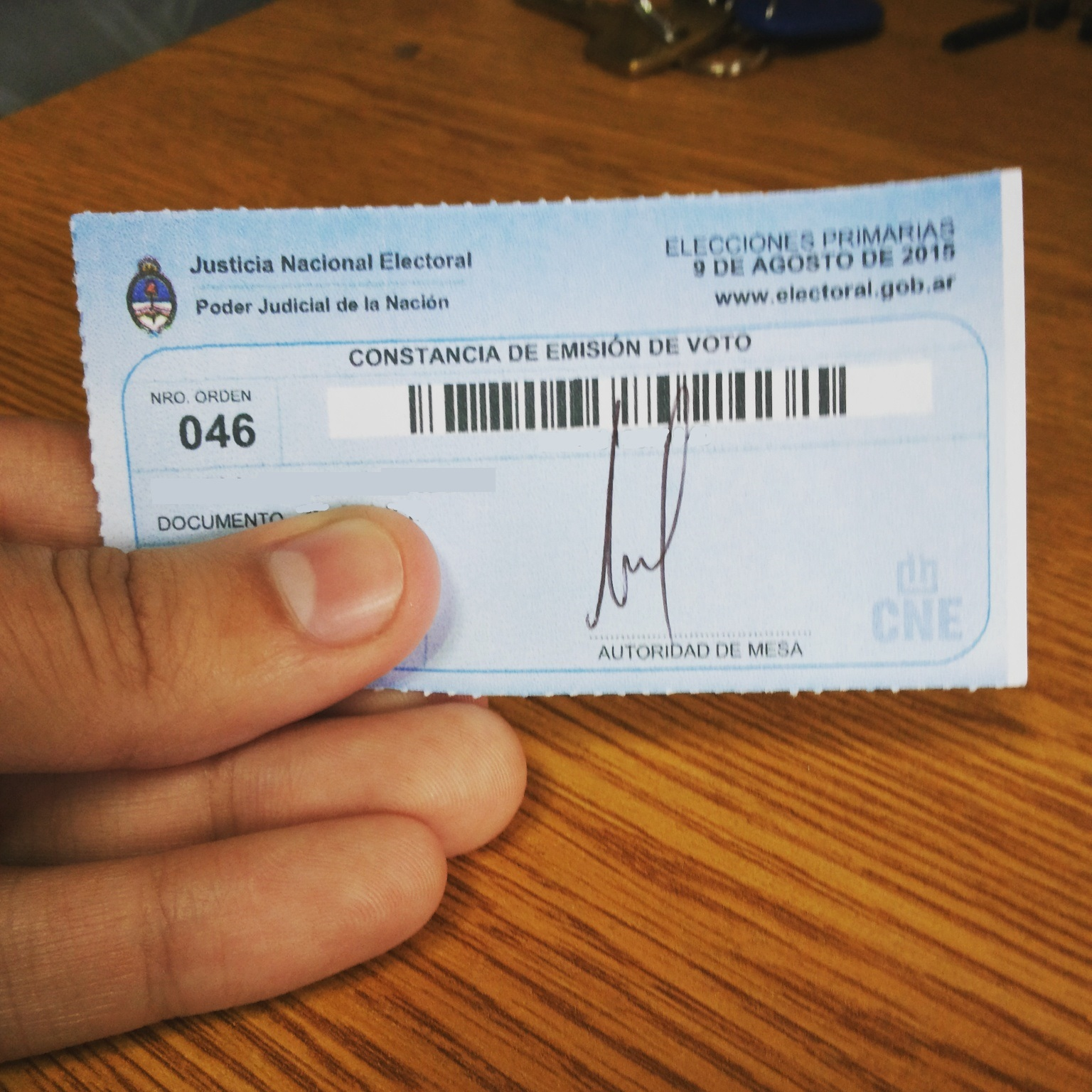 Constancia de voto de las PASO 2015. Los datos personales fueron tapados.